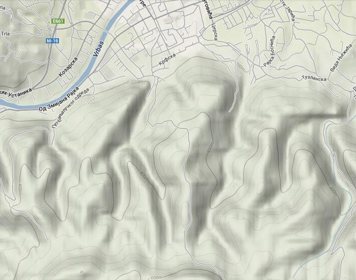 Karta uzvišenja ba jugu Banjaluke:Banj brdo, Starčevica, Presnače